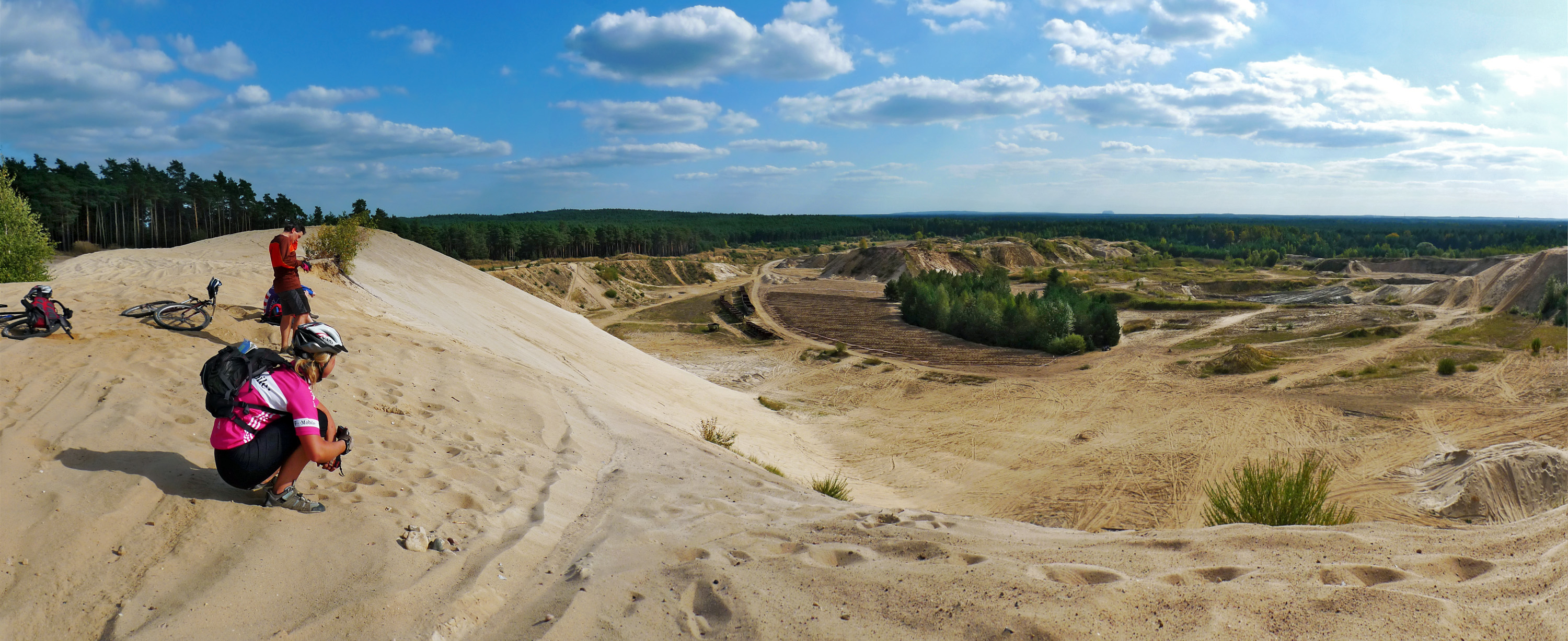 Landschaftsschutzgebiet "Dahme-Heideseen"; Naturschutzgebiet "Pätzer Kiesgrube"